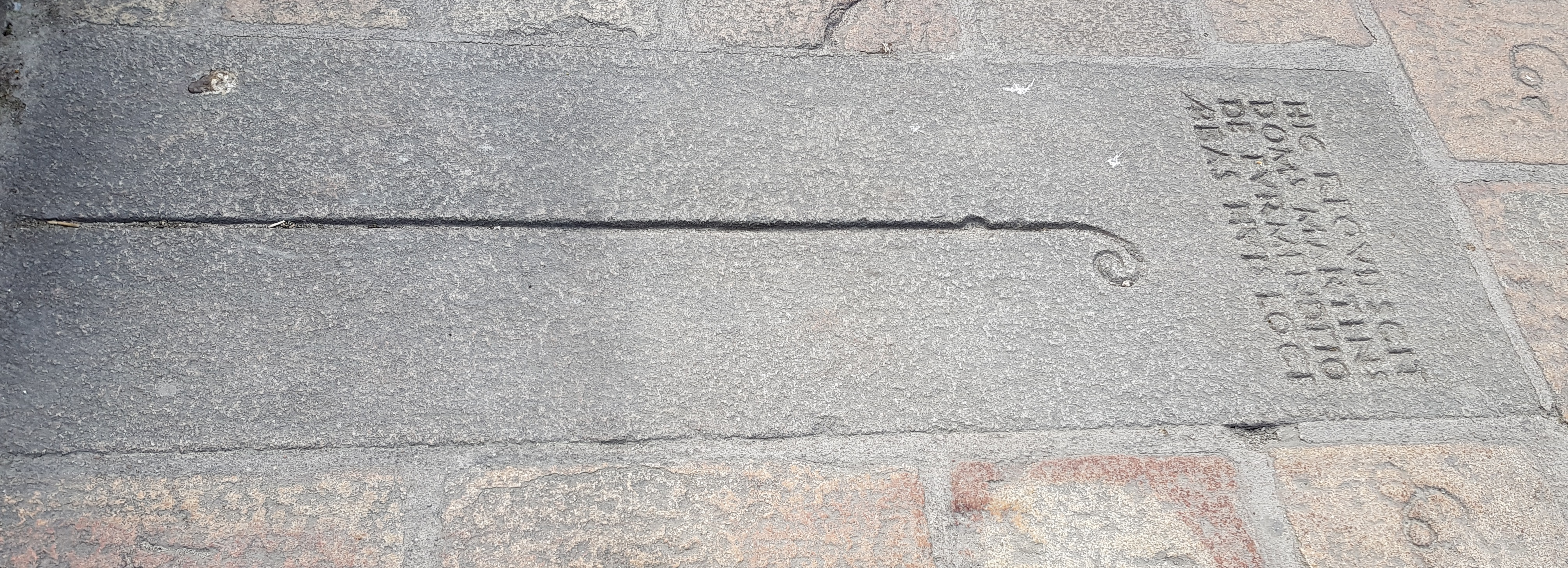 Pierre tombale de Martin de Furmendi, abbé du Mont-Saint-Michel de 1186 à 1191 (abbaye du Mont-Saint-Michel, terrasse ouest, devant l'église abbatiale).